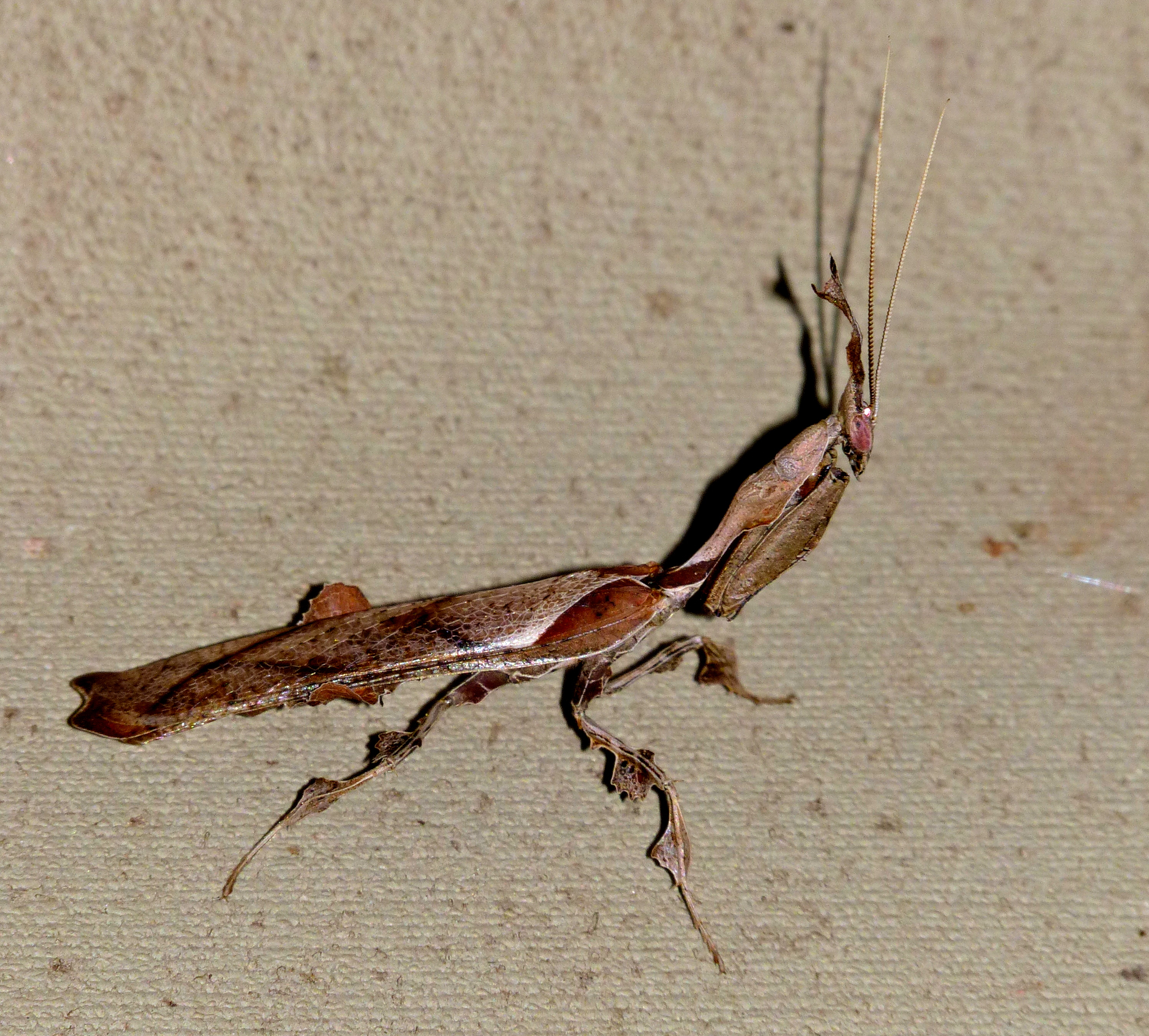 Lower Sabie Camp, Kruger NP, SOUTH AFRICA